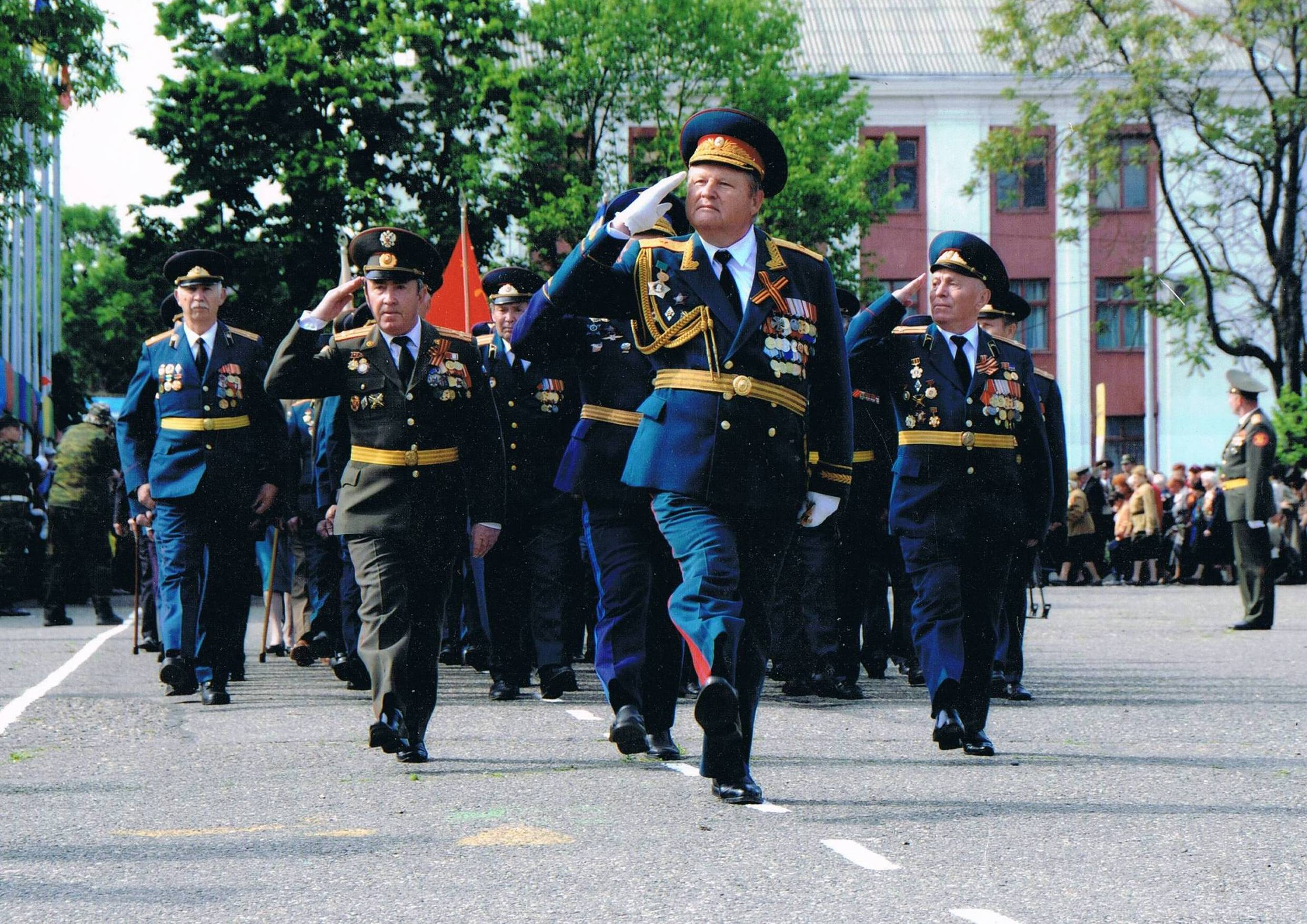 День Победы в Майкопе. Ветераны 9-й мотострелковой дивизии на Параде Победы. Республика Адыгея 9 мая 2005 года.